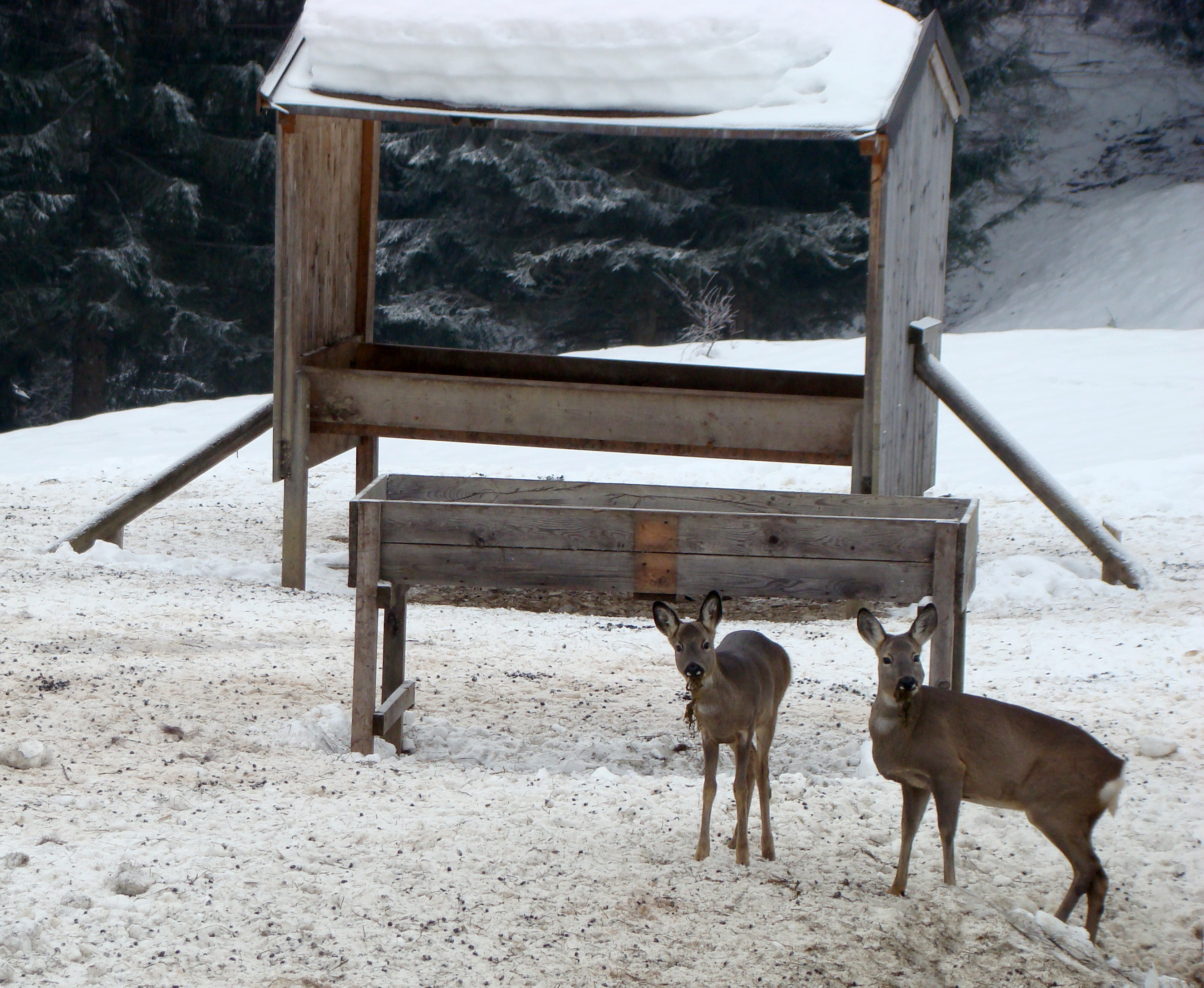 Zwei Rehe an einer Futterkrippe im Wald bei Oberstdorf